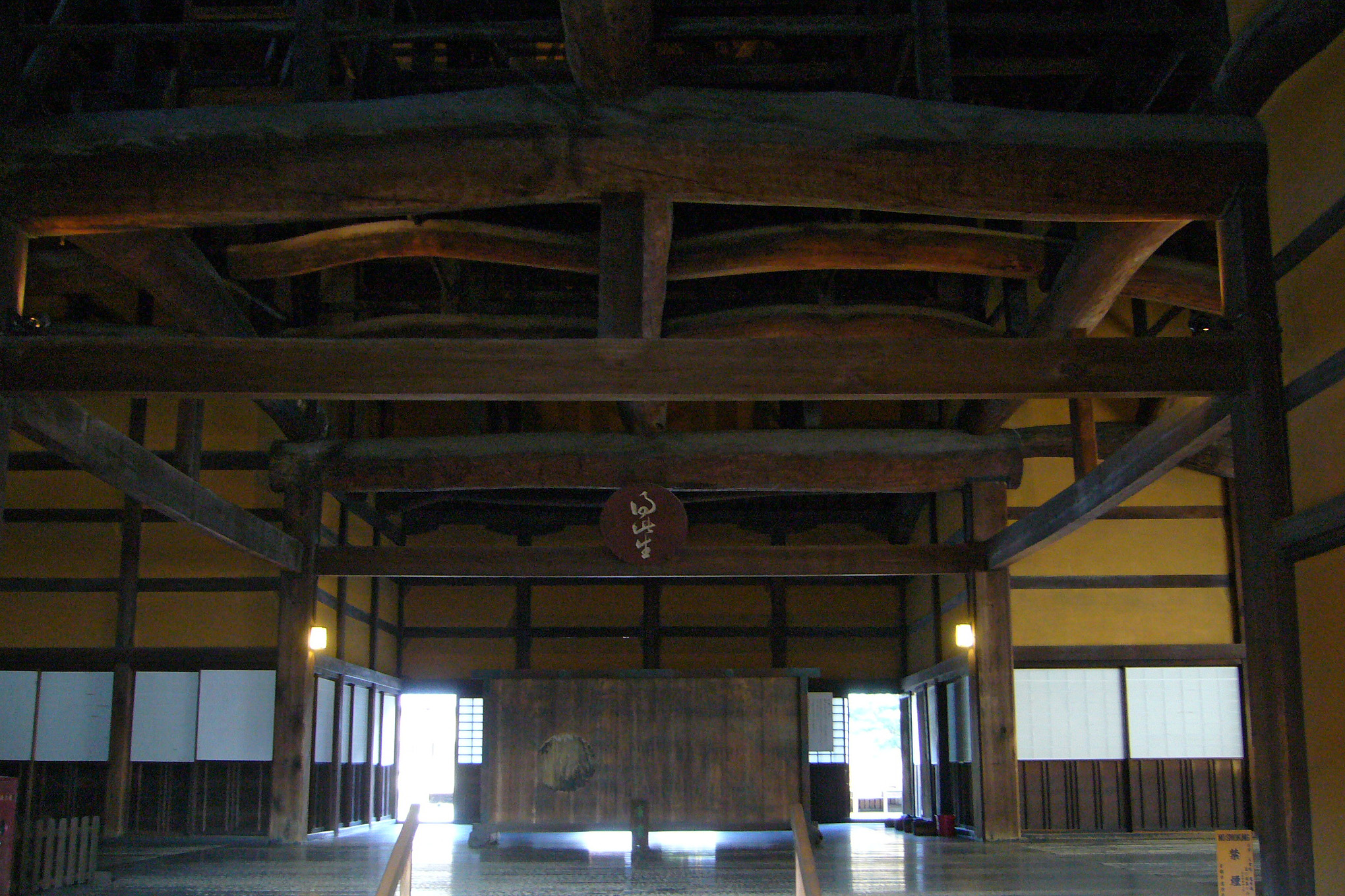 Myohoin in Kyoto, Japan